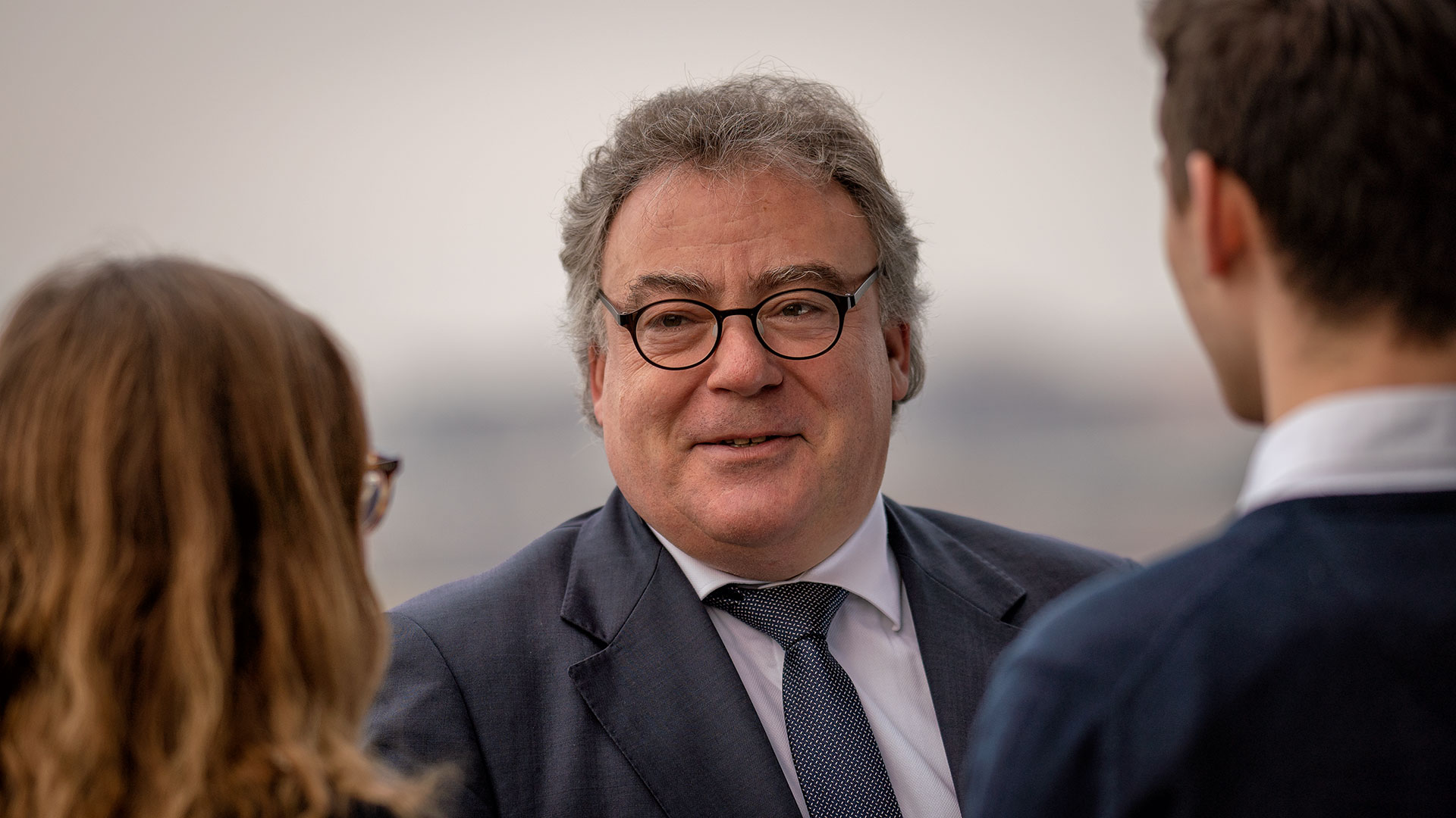 Lehne, Olaf im Gespräch